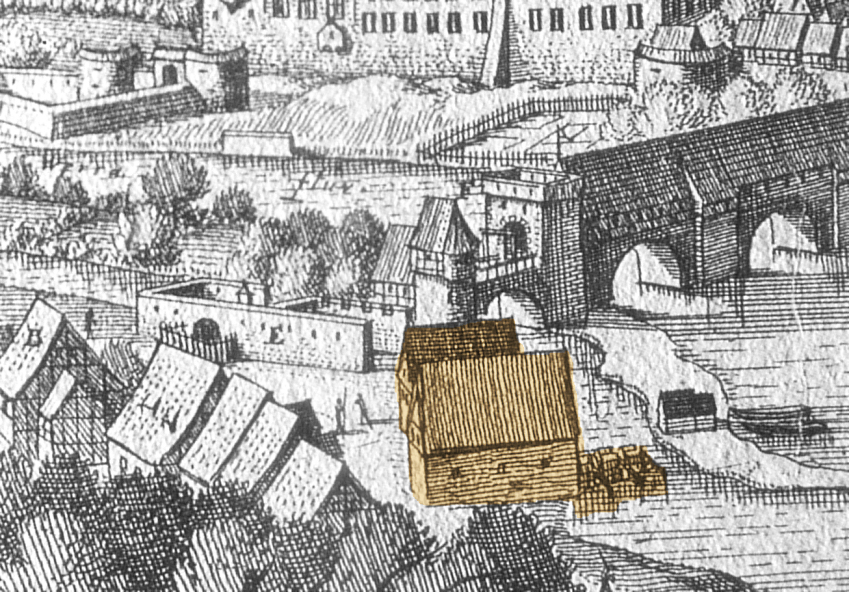 Hospital St. Spiritus, nachträglich koloriert